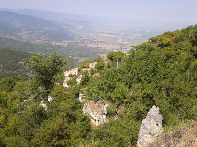 La faglia nei pressi di Sperone sul monte Serrone a Gioia dei Marsi